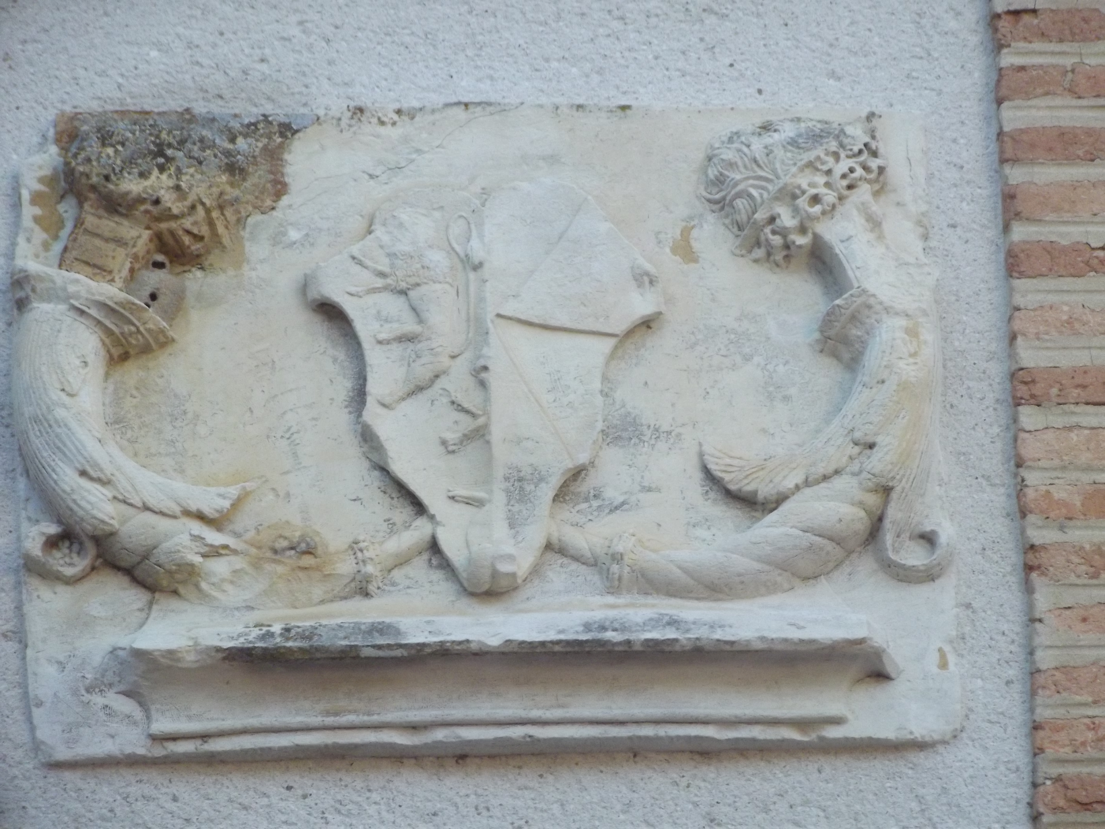 Blason